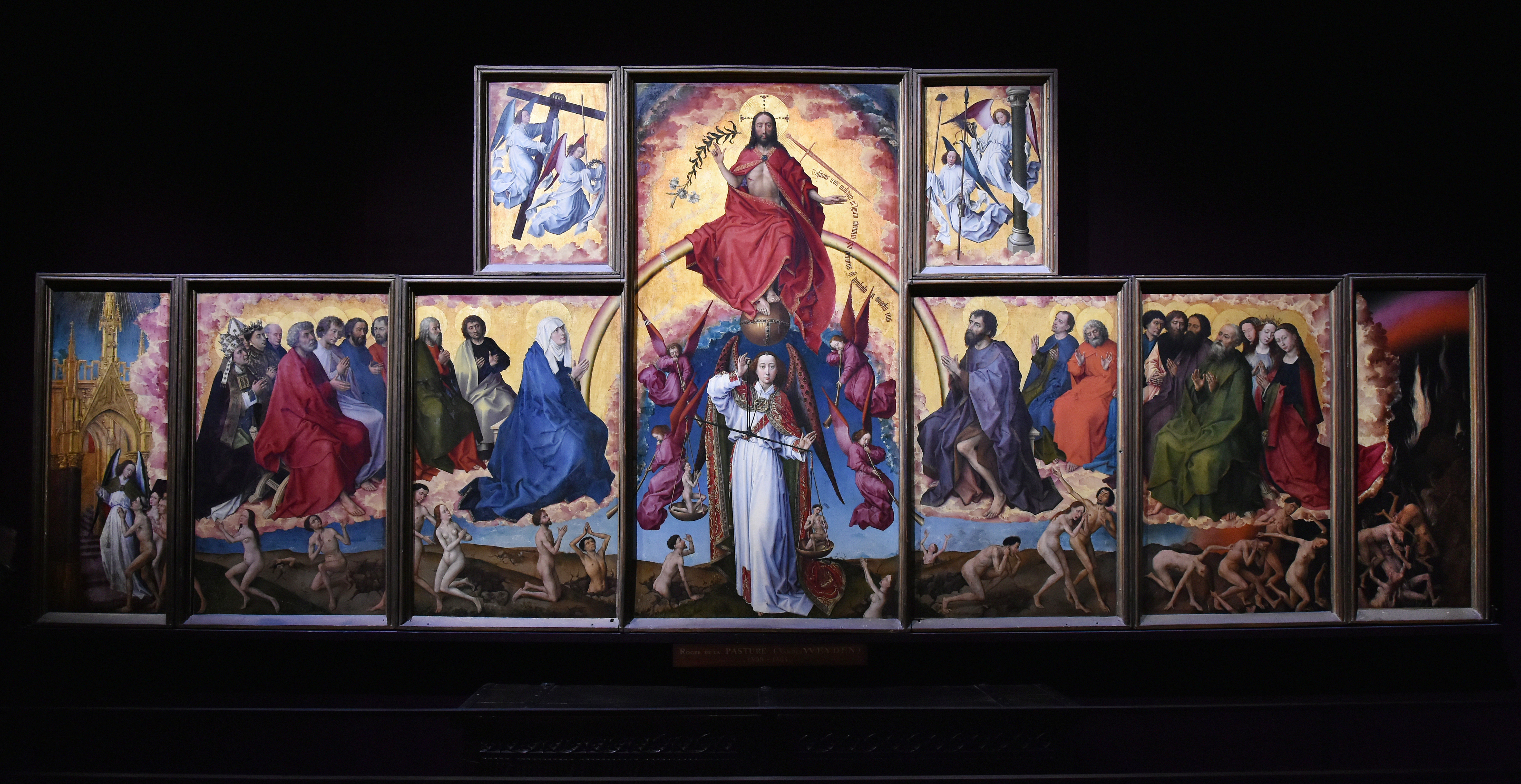 Rogier van der Weyden (1399of1400-1464) Het Laatste Oordeel - Hôtel-Dieu Beaune